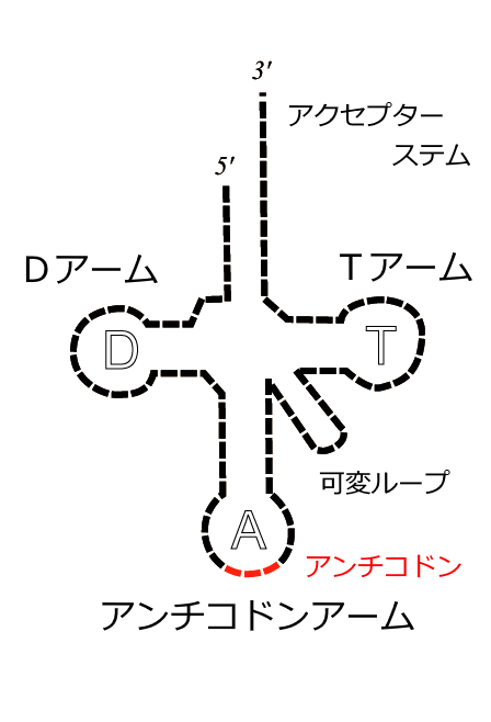 転移ＲＮＡの構造（クローバーリーフ）